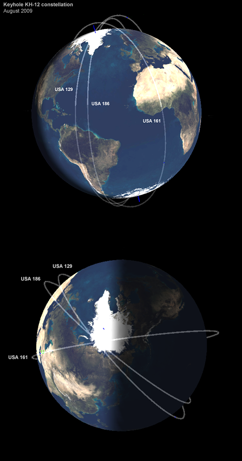 KH 12 constellation